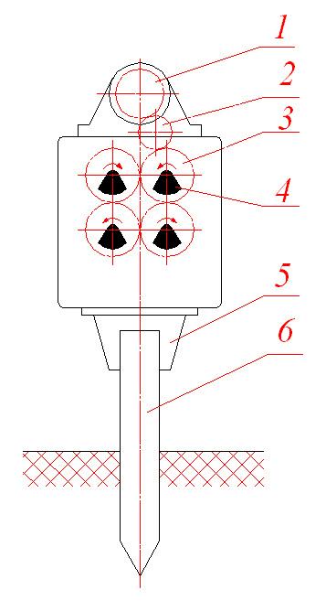 Конструктивная схема вибропогружателя